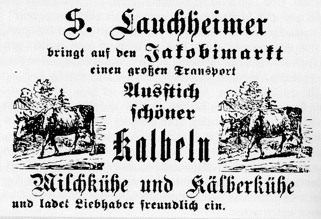 Anzeige von Samuel Lauchheimer in der Esslinger Zeitung